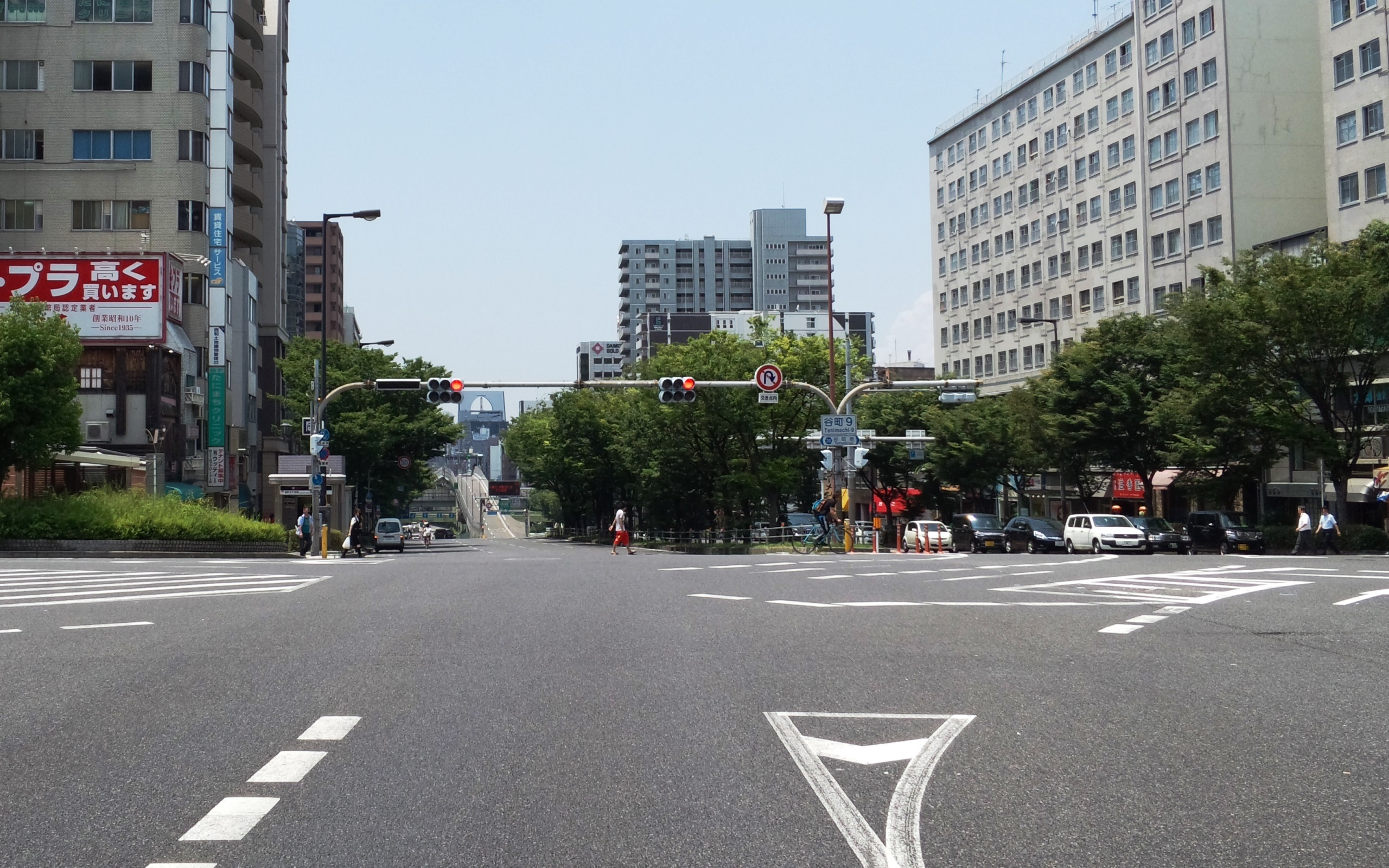 千日前通・谷町九交差点